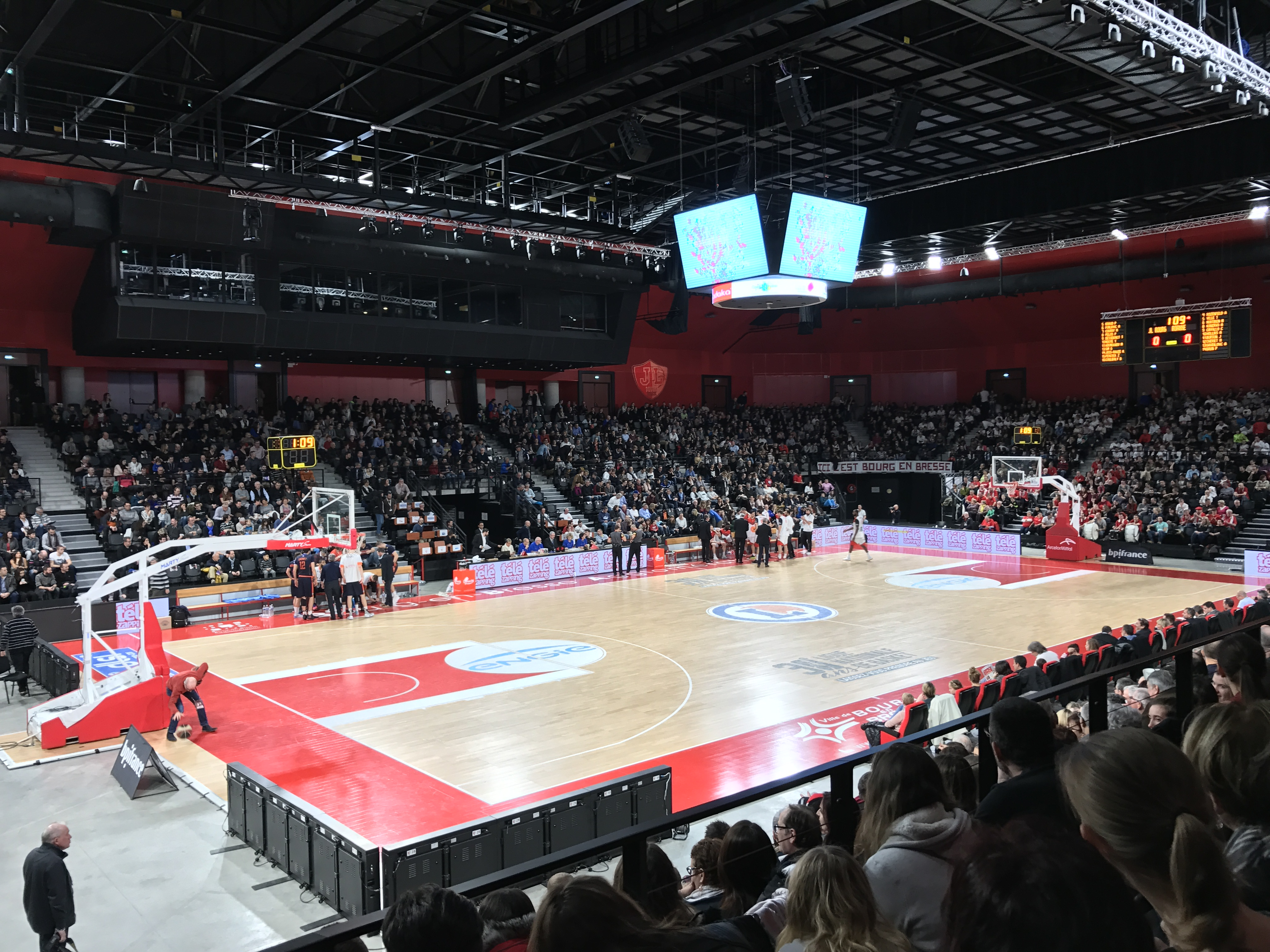 JL Bourg Basket contre la Chorale de Roanne à Ekinox le 27 décembre 2016.